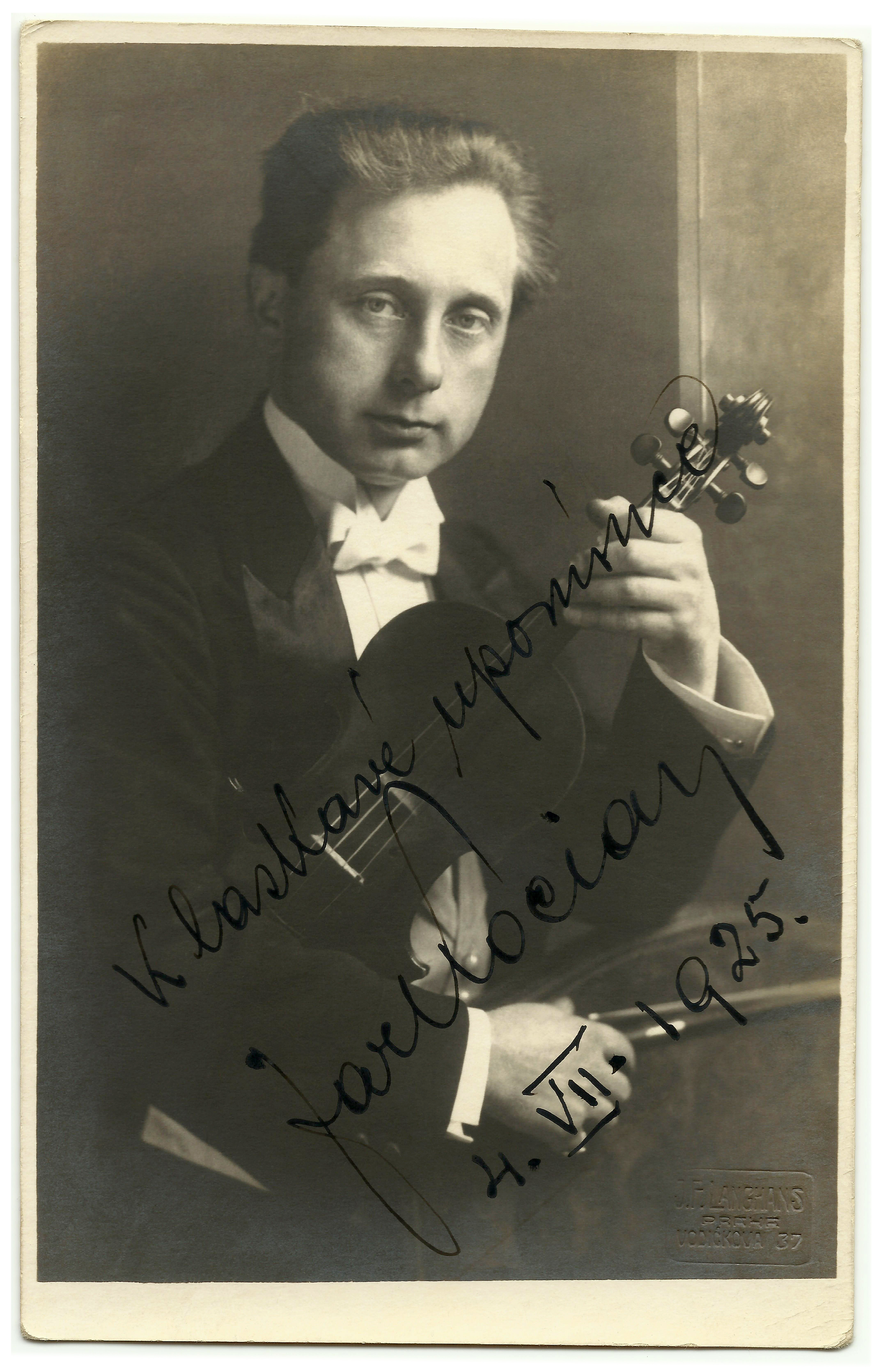 Husľový virtuóz Jaroslav Kocian so svojim nástrojom, venovaním a podpisom - K laskavé upomínce 4.VII.1925. Fotografia vznikla v slávnom fotografickom ateliéri J:F:LANGHANS, Vodičkova 37, PRAHA. Fotografia pochádza z archívu Prof.Gabriela Paulínyho - prvého slovenského husľového pedagóga a prvého pedagóga violy na Hudobnej škole pre Slovensko v Bratislave.